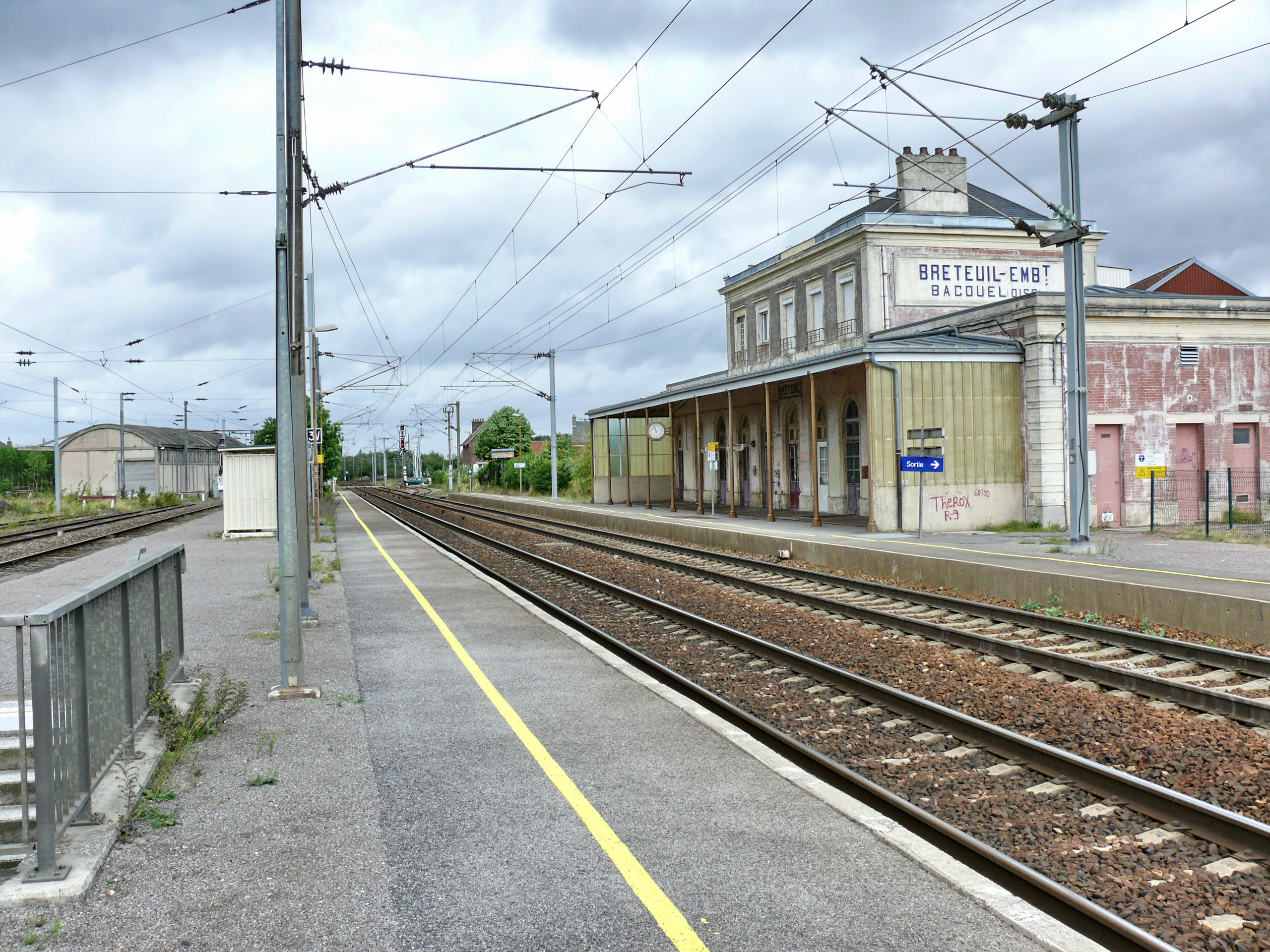 Gare de Breteuil-Embranchement (Commune de Bacouël - Oise - Picardie - France)